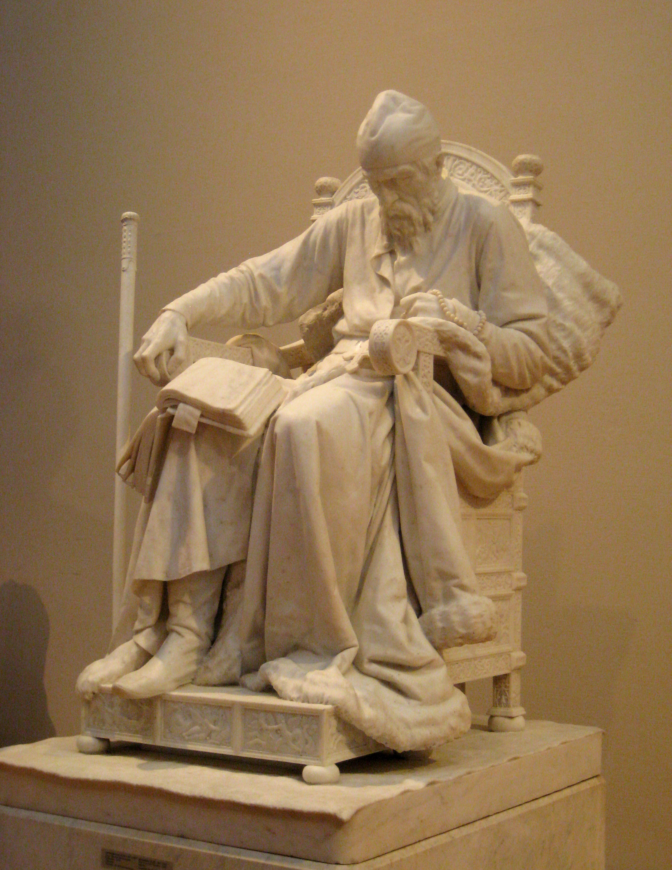 «Царь Иоанн Васильевич Грозный». Скульптура работы Марка Антокольского. Мрамор, ГТГ. 1875 год. Скульптура выполнена по заказу П. М. Третьякова.